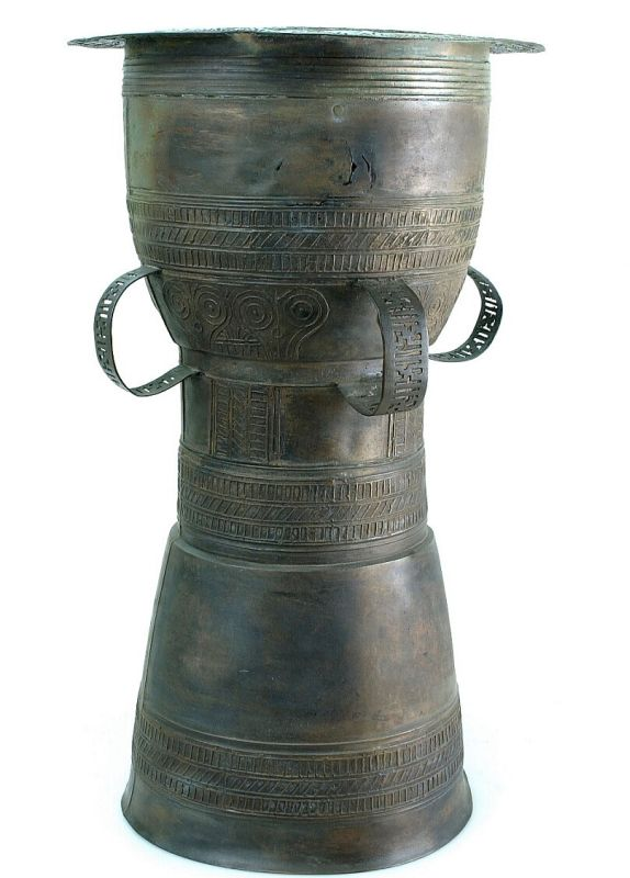 Ruilmiddel. Zandlopervormige trom van brons Unknown language: Moko